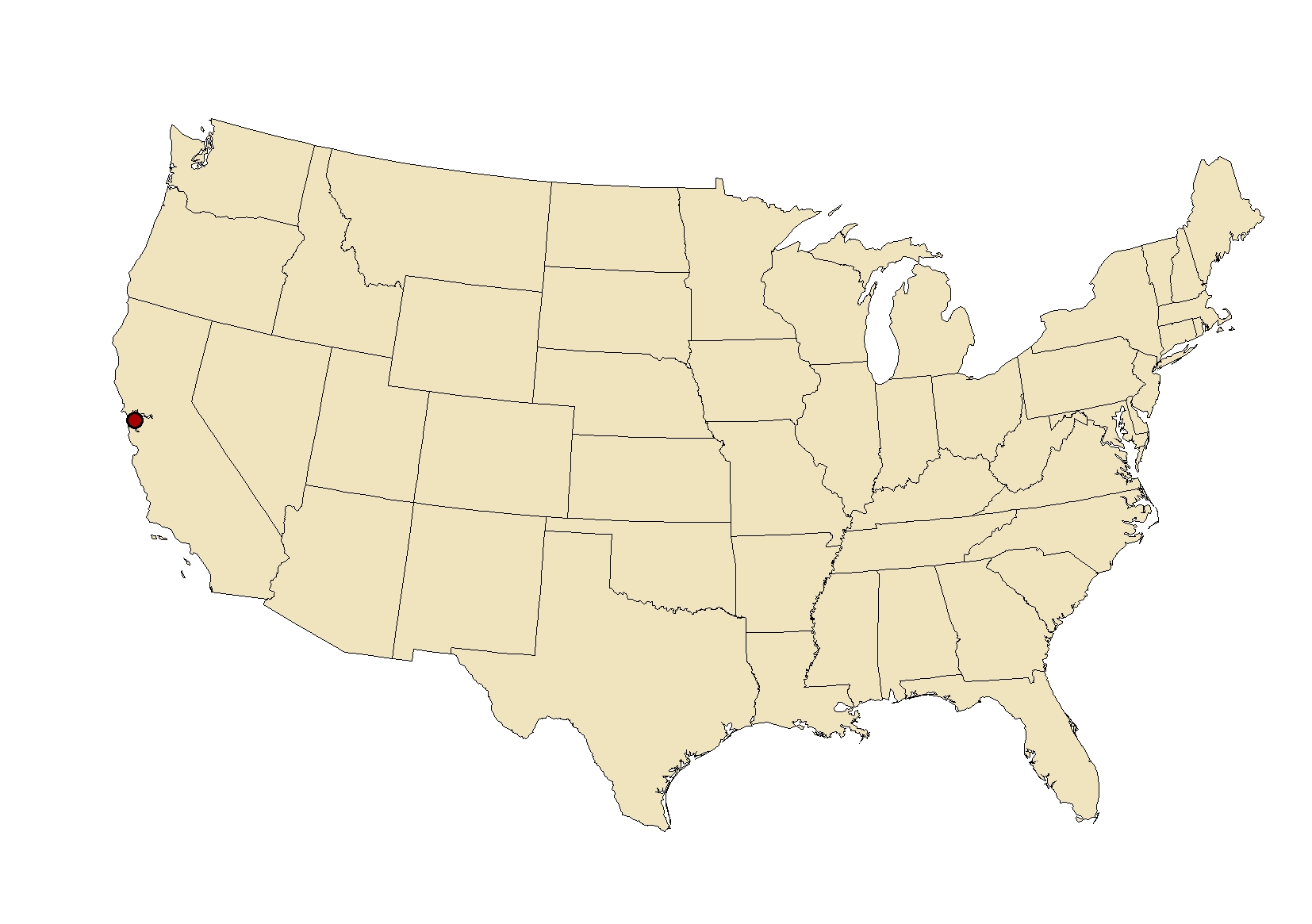 Map of Oakland